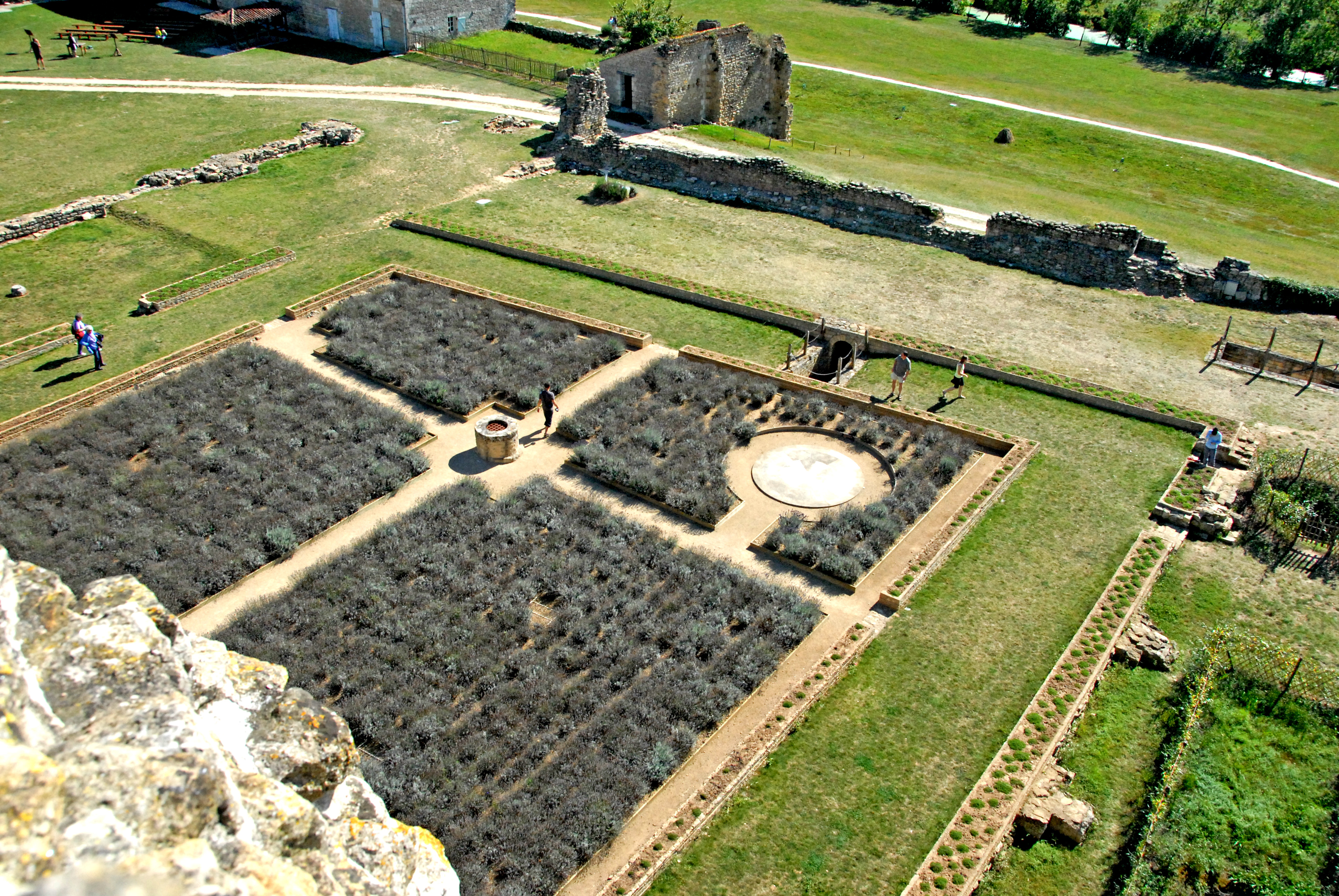 Maillezais